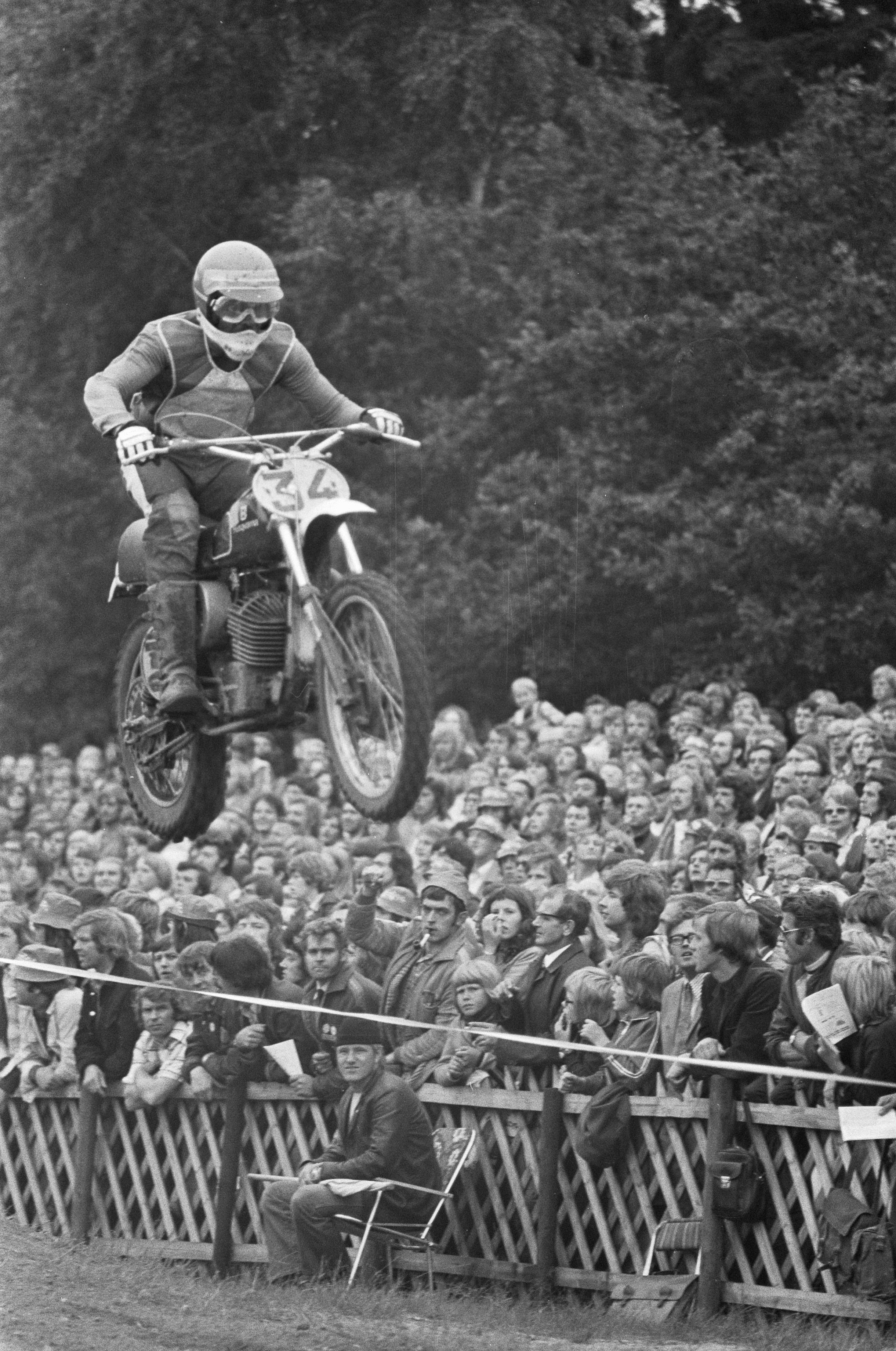 Collectie / Archief : Fotocollectie Anefo Reportage / Serie : [ onbekend ] Beschrijving : Motorcross van Markelo; Heikki Mikkola springend Datum : 28 juli 1974 Trefwoorden : MOTORCROSS Fotograaf : Peters, Hans / Anefo Auteursrechthebbende : Nationaal Archief Materiaalsoort : Negatief (zwart/wit) Nummer archiefinventaris : bekijk toegang 2.24.01.05 Bestanddeelnummer : 927-3560